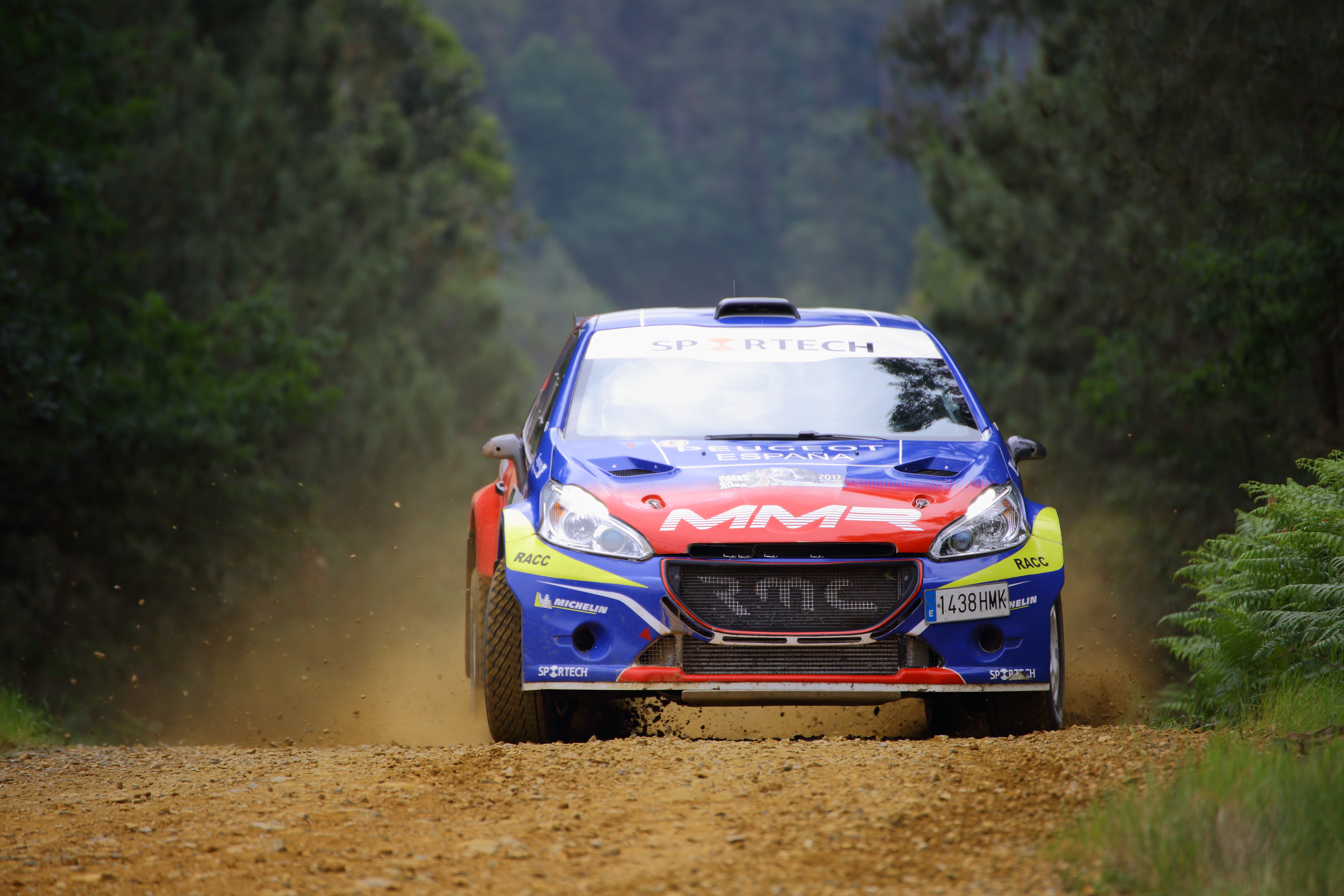 Rally Terra da Auga, perteneciente al CERT, Campeonato Español de Rally de Tierra), con sede en el ayuntamiento de Touro, Galicia